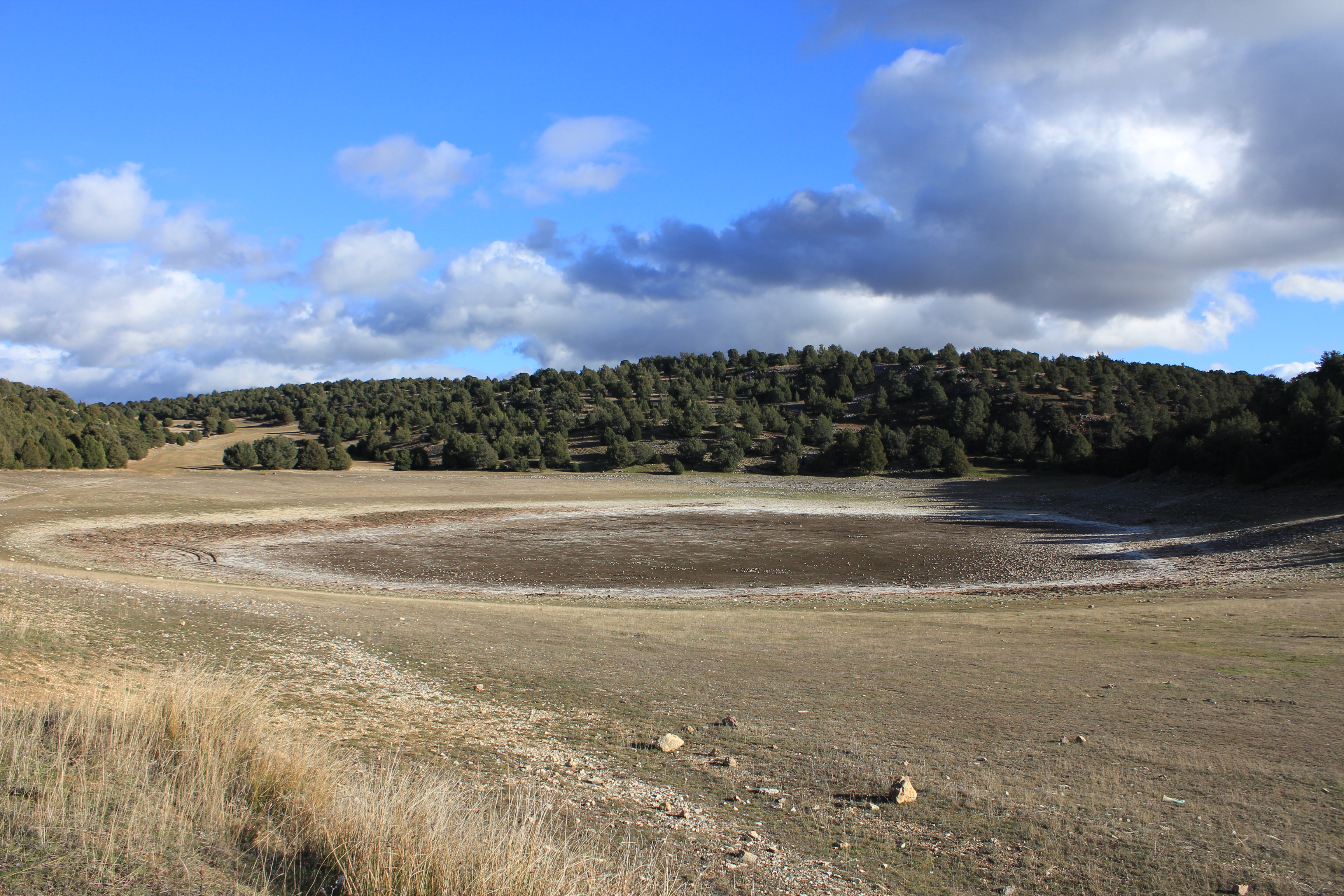 Sabinares del Jalón This is a photography of a Site of Community Importance in Spain with the ID: ES4170057. Natura2000 entry, EEA entry